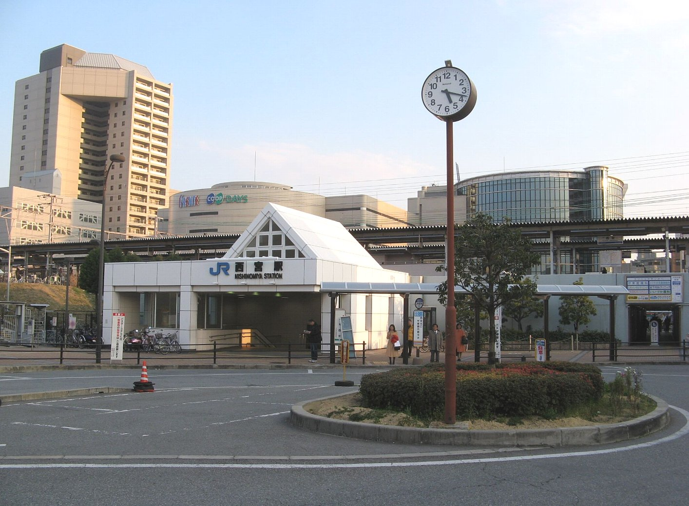 東海道本線 西宮駅 北口駅舎 2007年3月21日 Bakkai撮影 Category:鉄道駅画像 Category:西日本旅客鉄道の画像 Category:西宮市の画像